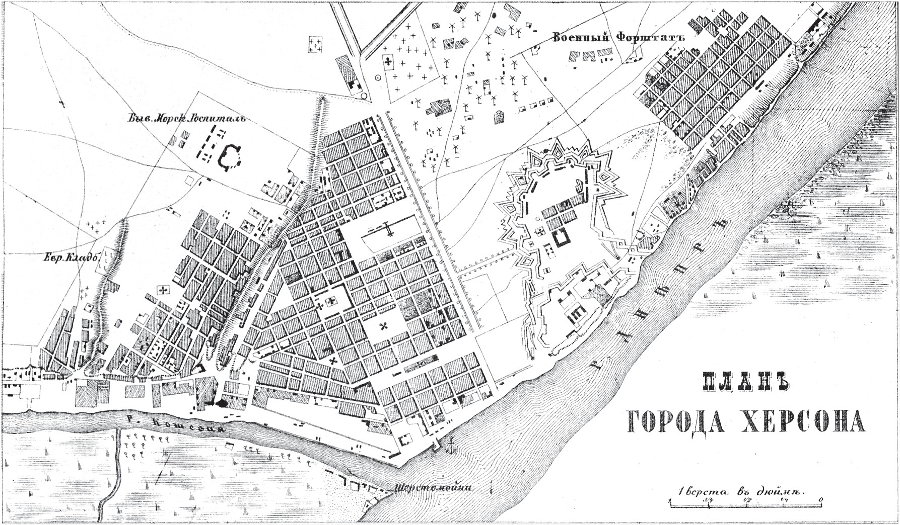 План города Херсона 1876 года